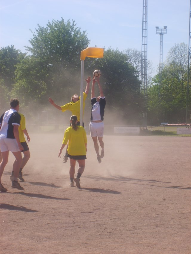 Duel between two korfballplayers during the match between ZKV(Zaandam, Netherlands) and ALO(The Hague, Netherlands).